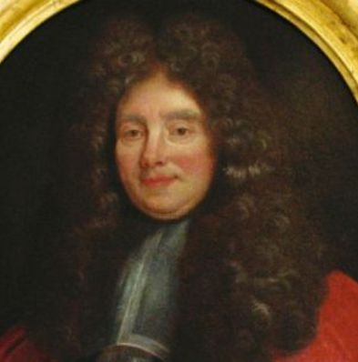 Michel Bégon (1638-1710), intendant de marine à Rochefort. Portait anonyme, début du XVIIIème siècle, musée de la Marine.